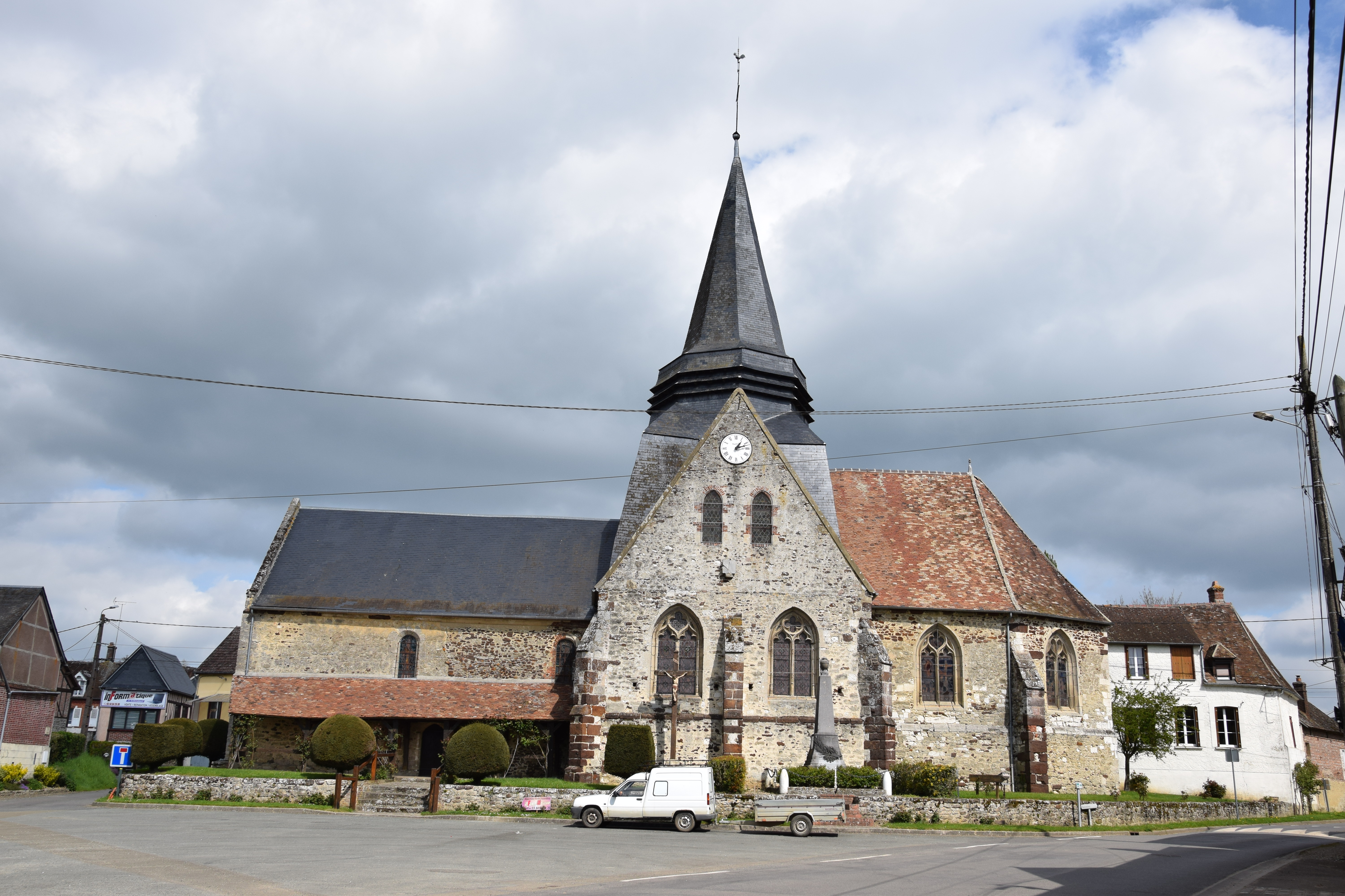 Blacourt